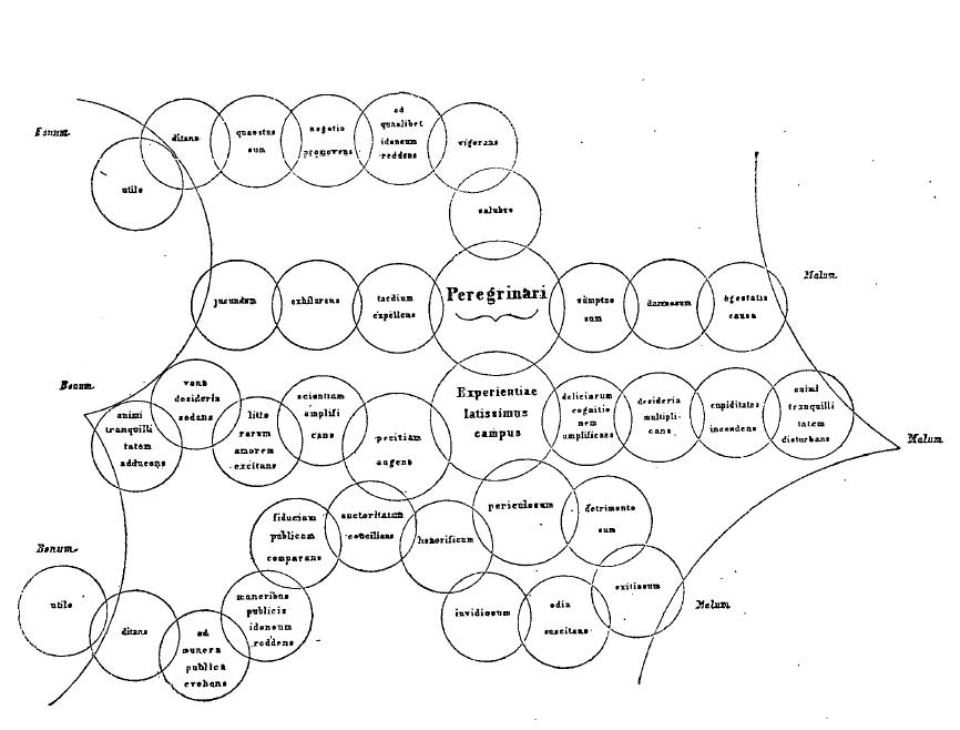 Illustration de Schopenhauer (1818), Le Monde comme volonté et comme représentation, § 9: J’ai pris pour exemple le concept de voyage. Sa sphère empiète sur celle de quatre autres, sur chacune desquelles l’orateur peut insister à son gré ; celles-ci, à leur tour, pénètrent dans d’autres, quelquefois dans deux ou trois en même temps, à travers lesquelles celui qui parle peut se diriger, comme s’il n’avait pas d’autre voie, pour arriver finalement au bien ou au mal, selon le but qu’il se propose. Il importe seulement, en passant d’une sphère à l’autre, d’aller toujours du centre (représenté par le concept principal) à la périphérie, sans jamais revenir sur ses pas. On peut, selon le faible de l’auditeur, présenter cette sophistique soit dans un discours suivi, soit dans les formes rigoureuses du syllogisme.(see also here.